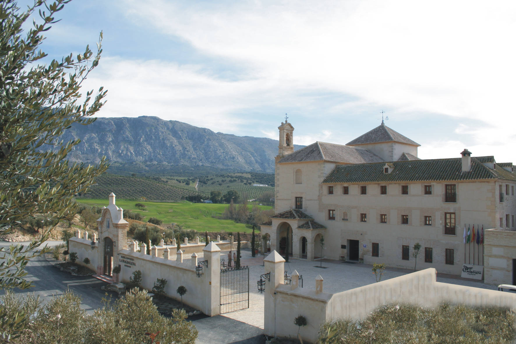 vista de la fachada del Hotel Convento La Magdalena, antiguo convento del siglo XVI situado a las faldas de El Torcal de Antequera (Málaga)